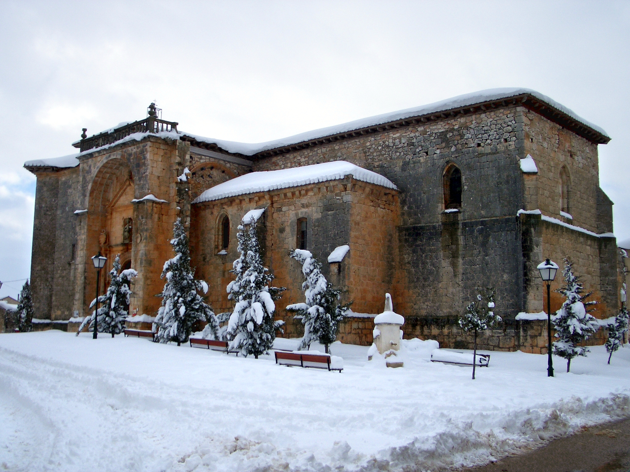 foto de la iglesia parroquial en la nevada de diciembre de 2004